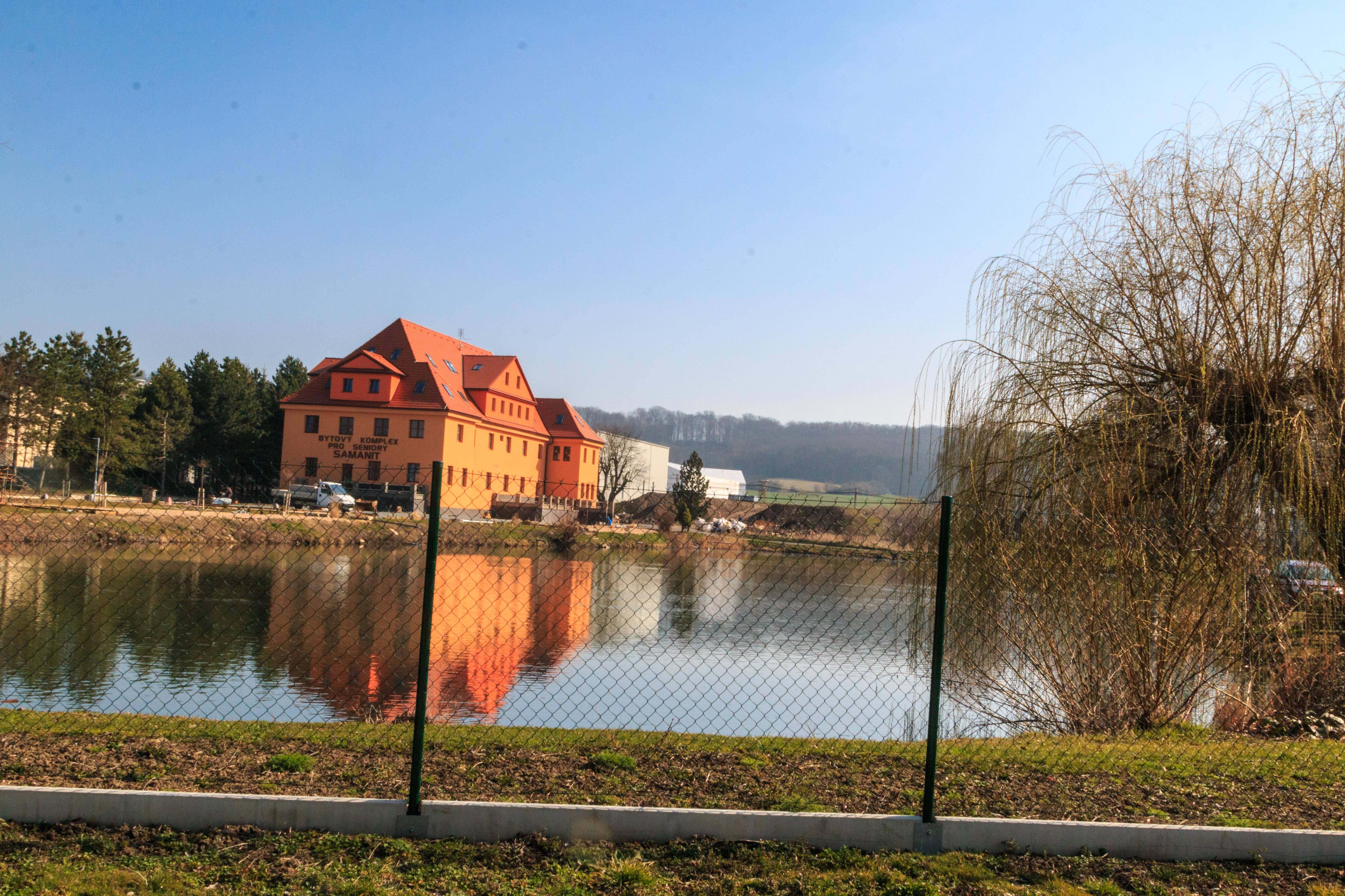 Cukrovarský rybník v Libáni